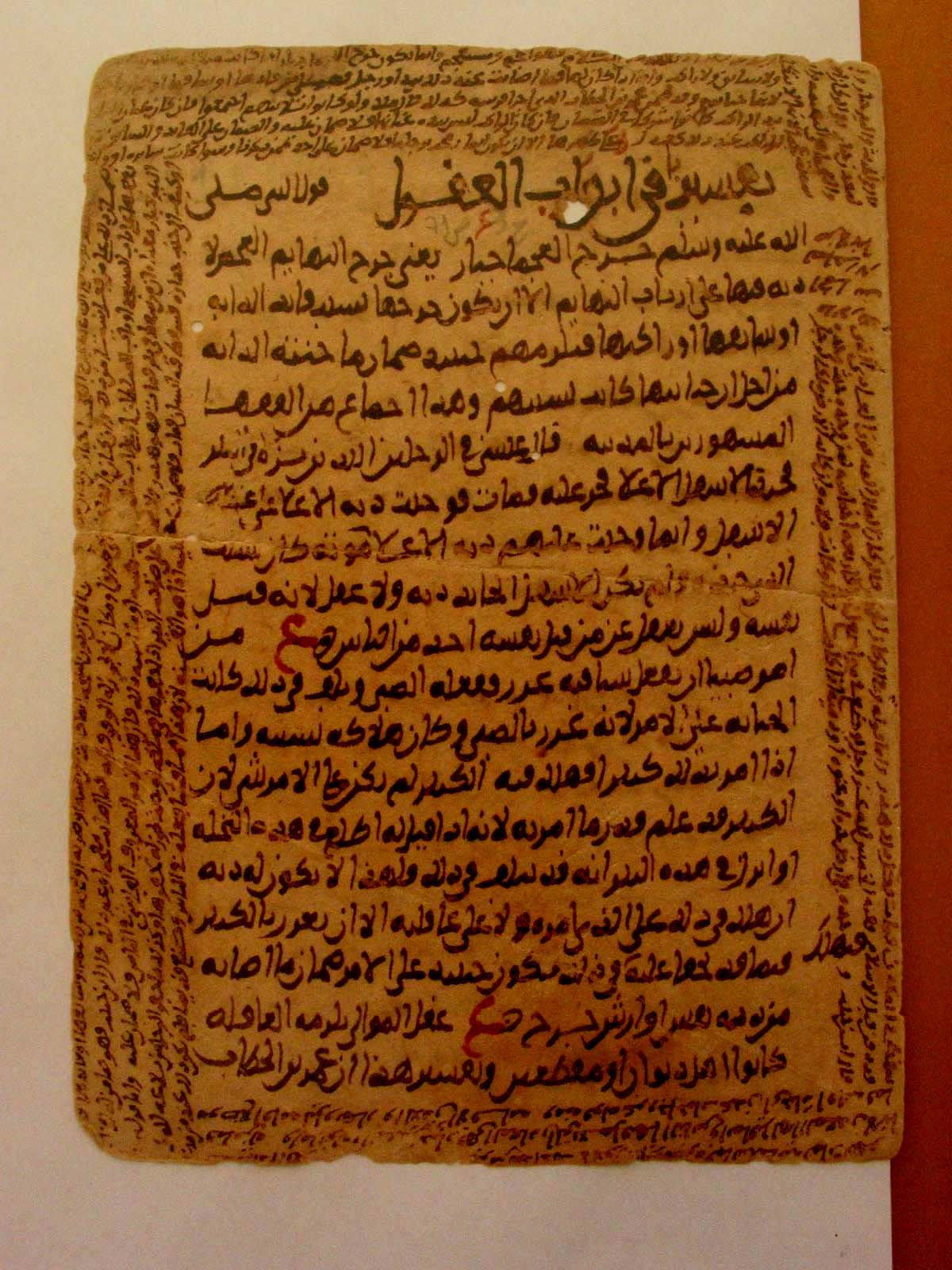 Blatt aus einem Kommentar zum Rechtswerk al-Muwatta' aus dem 11. Jahrhundert Eigene Reproduktion